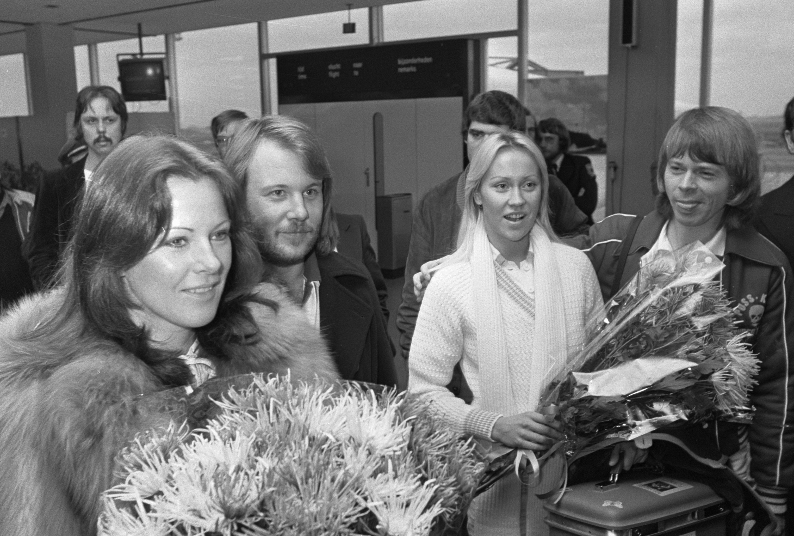 Zweedse popgroep Abba in Nederland; v.l.n.r. Benny, Frida, Anna en Björn op Schiphol in de bloemetjes